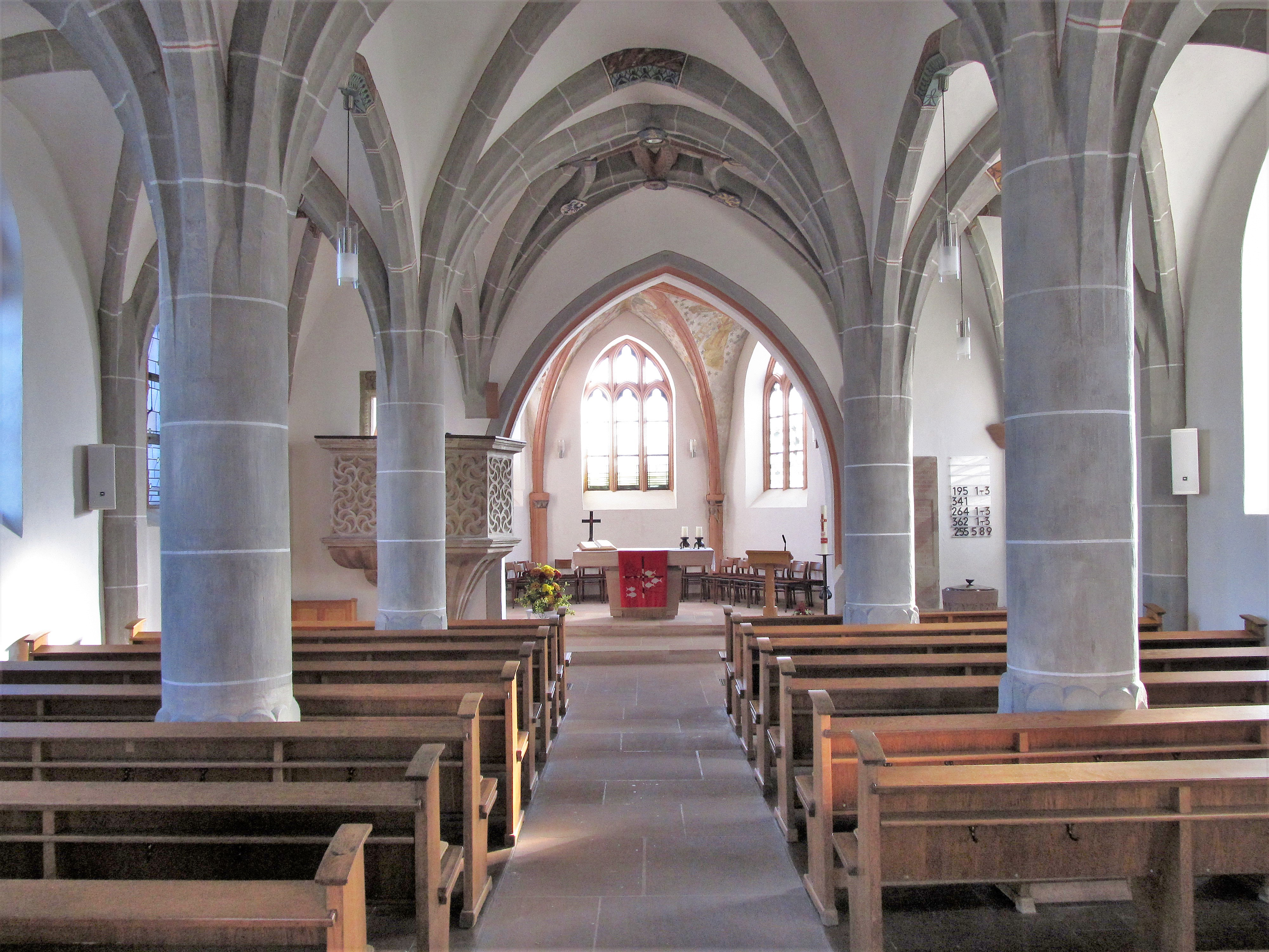 Blick ins Innere der evangelischen Martinskirche in Köllerbach, einem Stadtteil von Püttlingen, Saarland